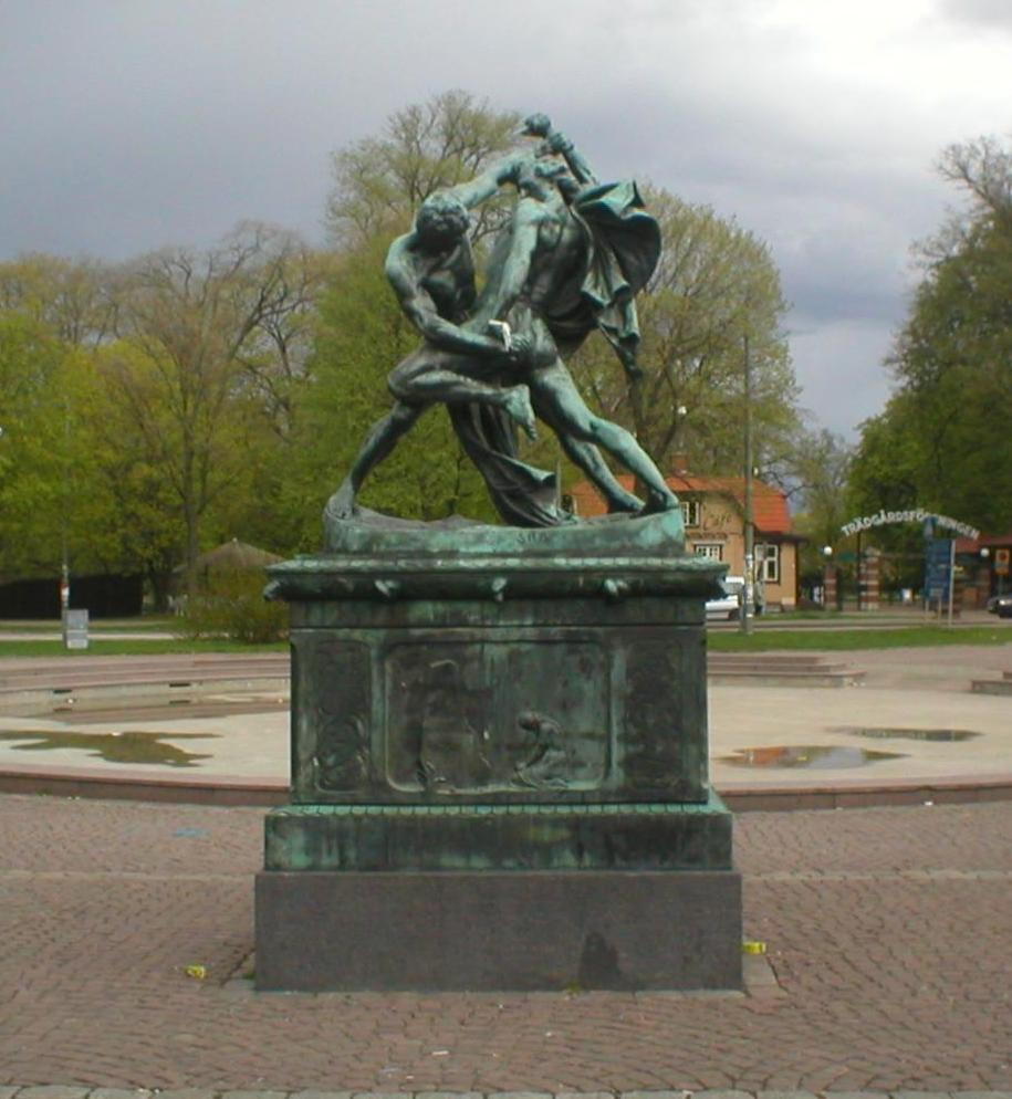 Foto av konstverket Bältespännarna, Göteborg, taget av Per Johansson 2005. 16 september 2005 kl.21.00 Per Johansson 915x994 (95780 bytes) (Foto av konstverket Bältespännarna, Göteborg, taget av Per Johansson 2005. GFDL )